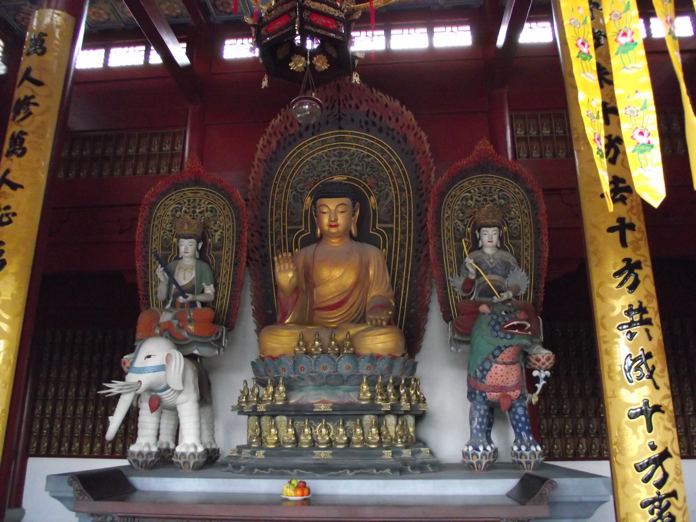 Bouddha du temple bouddhiste à Pairi Daiza